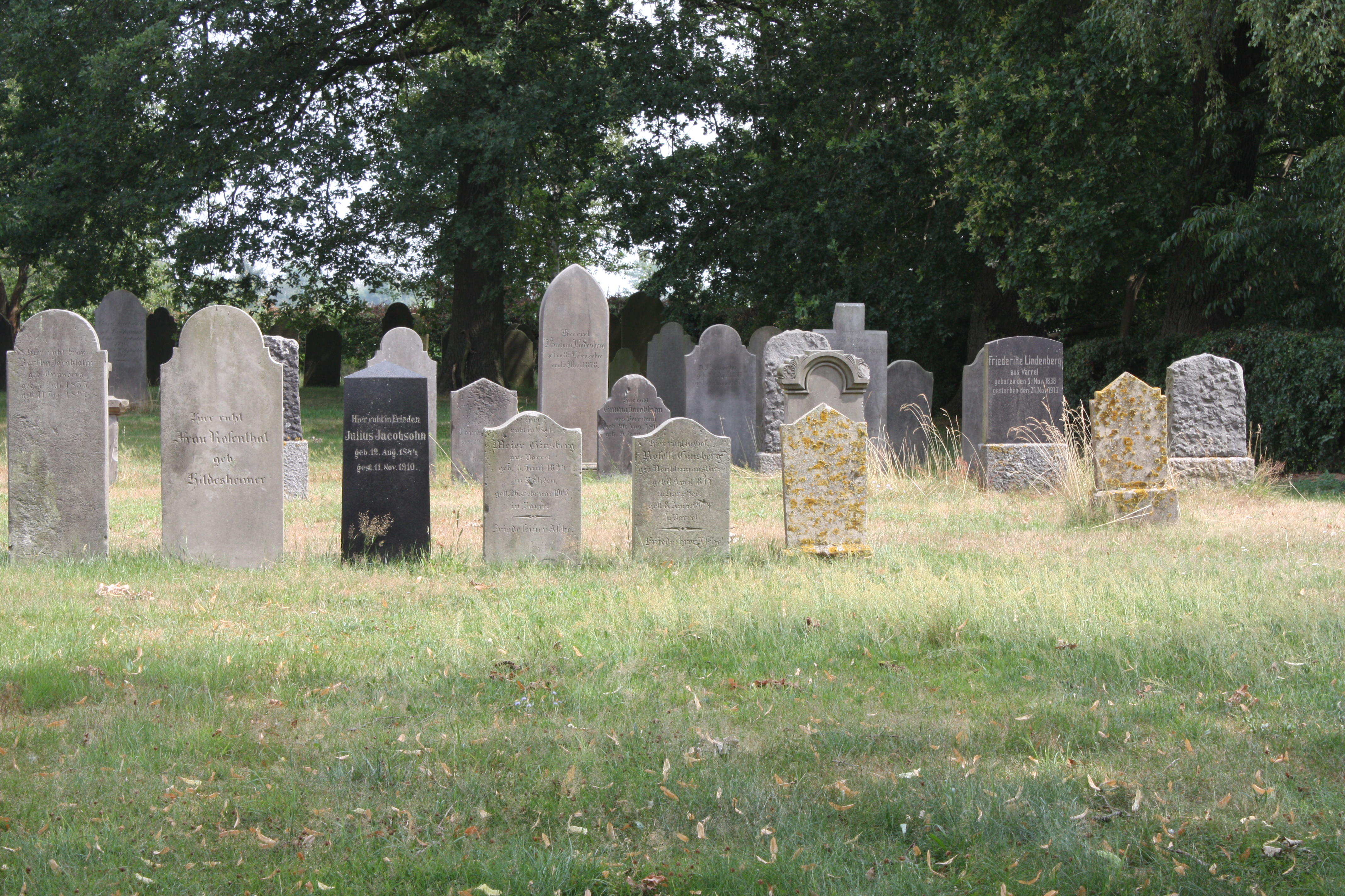 Jüdischer Friedhof Barenburg, Landkreis Diepholz, Niedersachsen